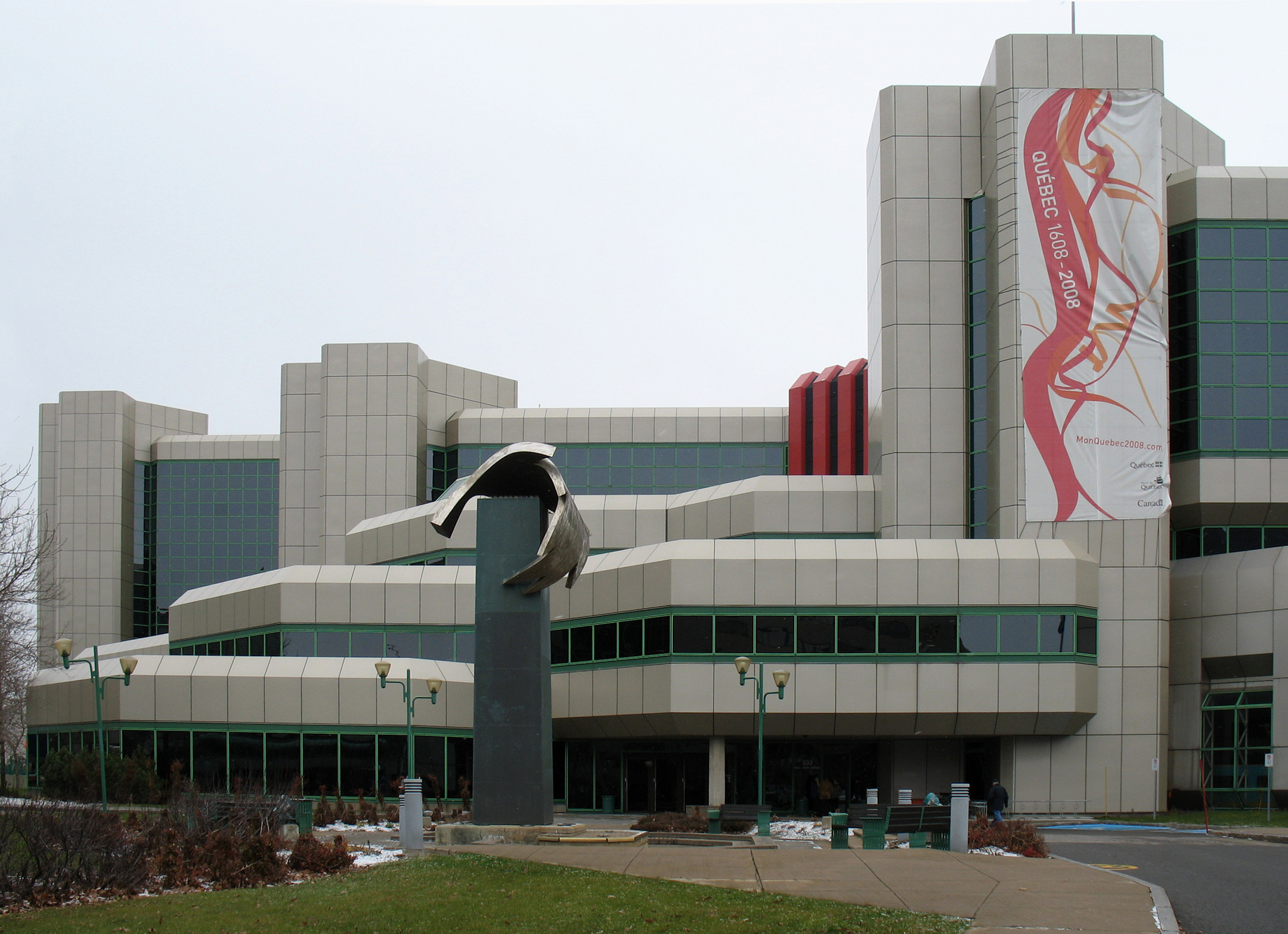 Siège social de la Société de l'assurance automobile du Québec dans la basse-ville (quartier Vieux-Québec—Cap-Blanc—colline Parlementaire) de Québec, Province de Québec, Canada